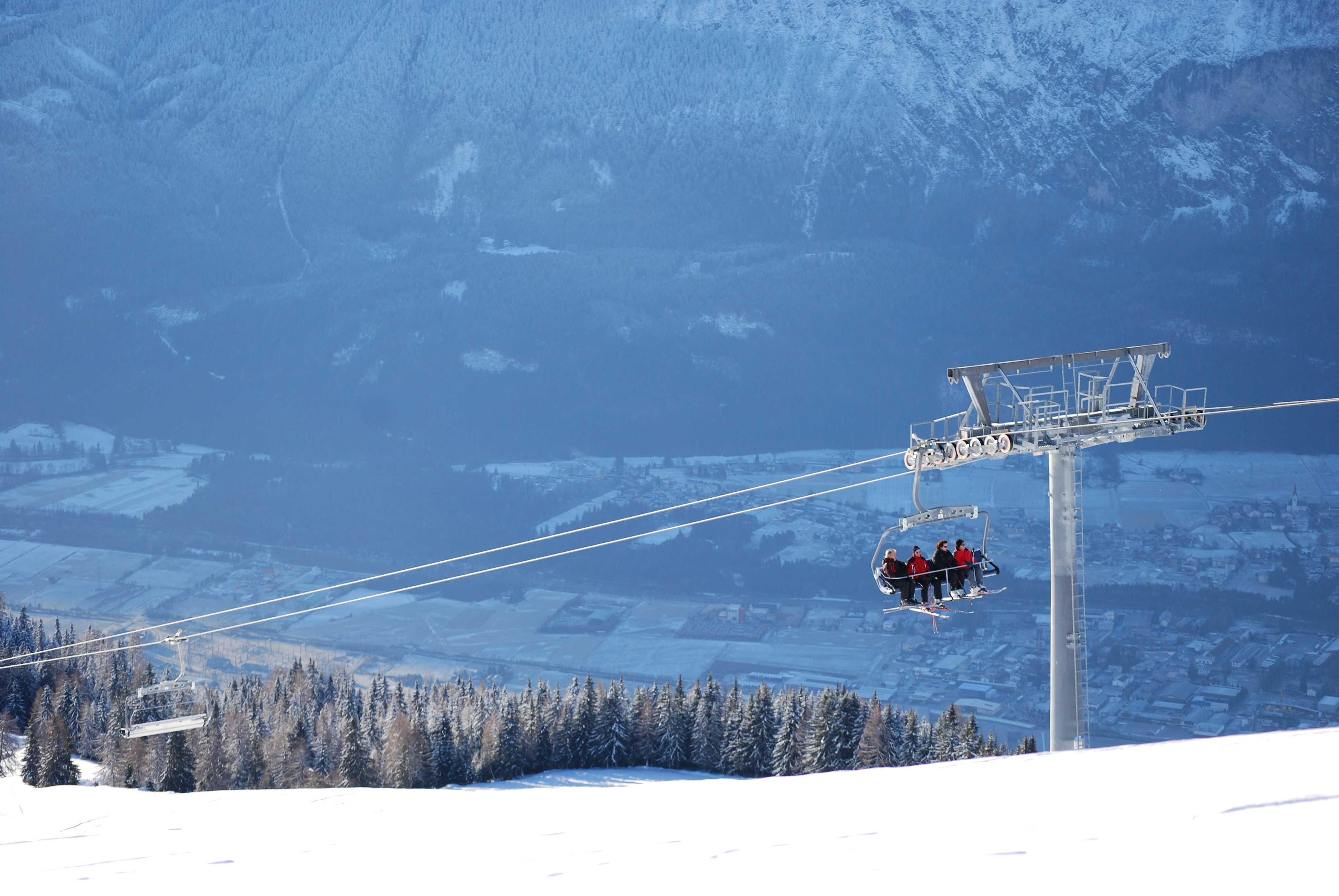 Faschingalmbahn